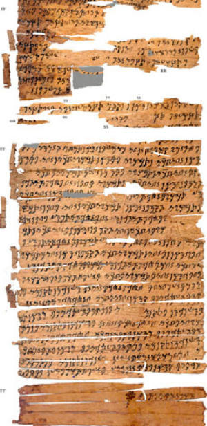 Imagen de textos budistas de Gandhara